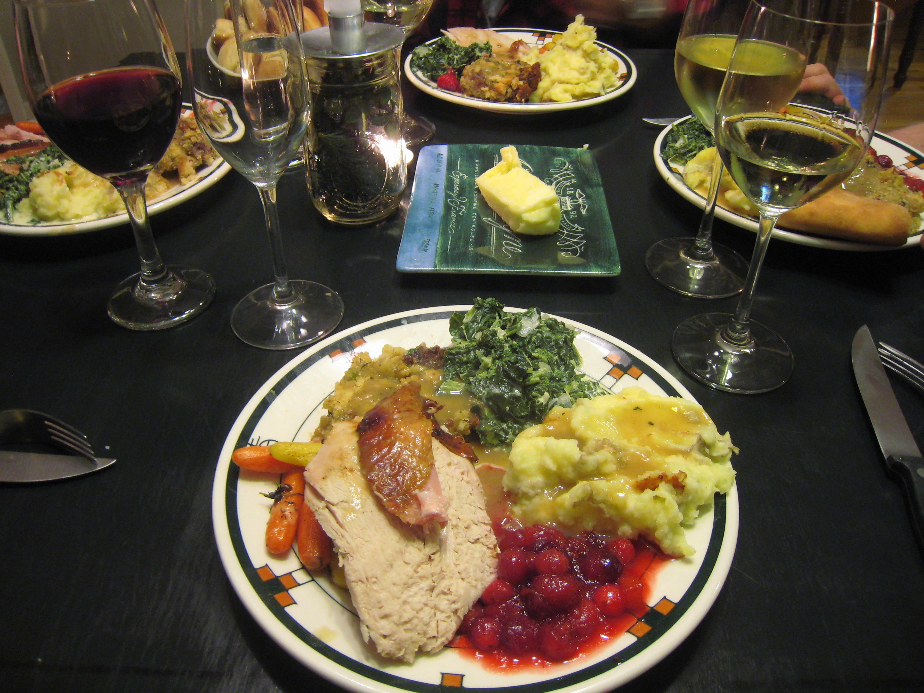 Vin de pays isère IGP blanc et rouge